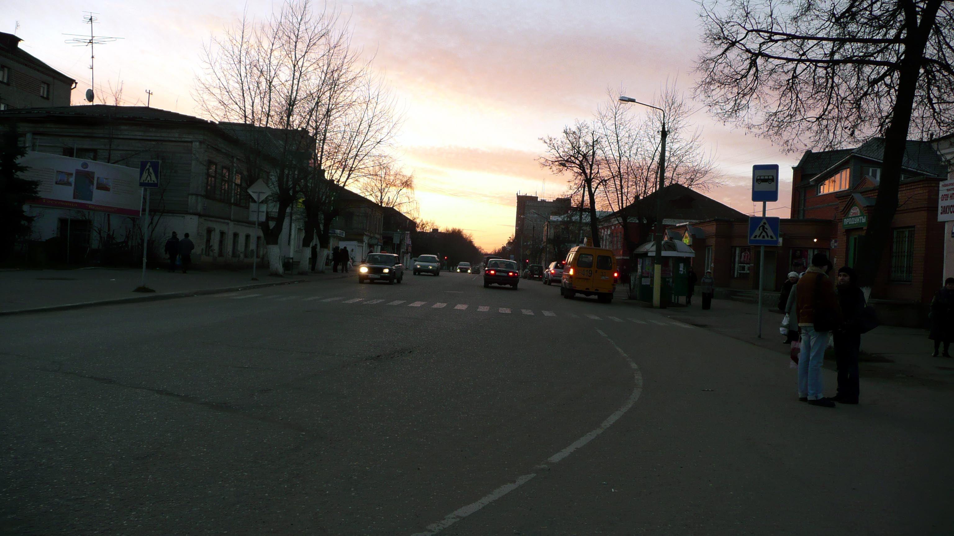 Lenin Street, in Alexandrovsk, Vladimir Oblast, Russia